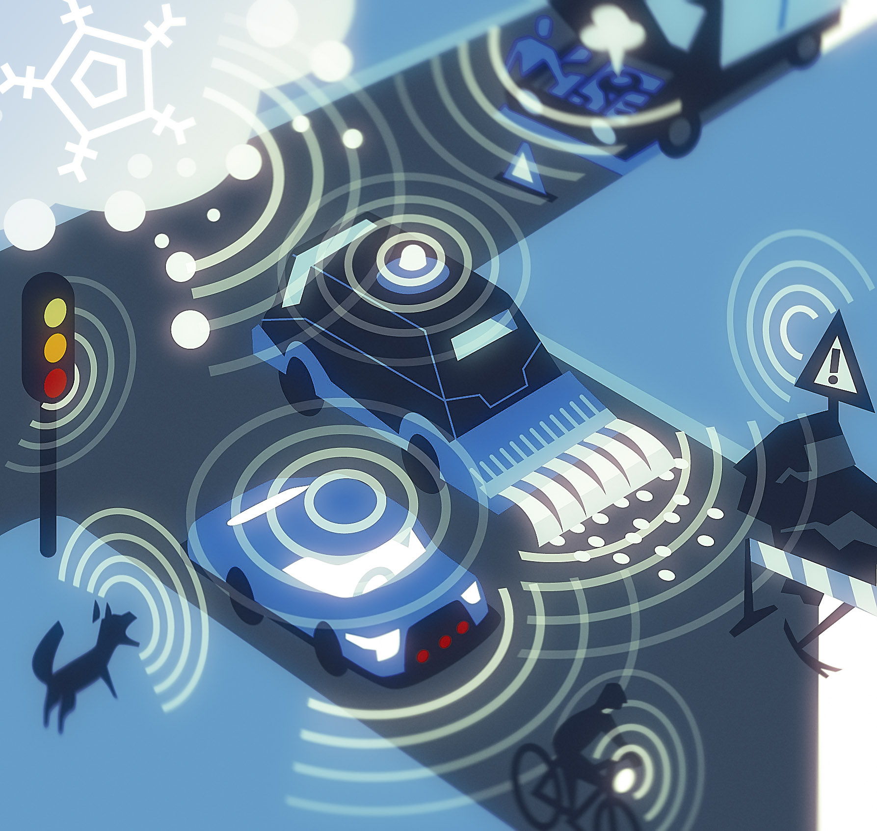 Grafische Darstellung (Symbolbild) der drahtlosen Kommunikation zwischen Fahrzeugen und ihrer Umgebung mit digitalen Mitteln, auch Car2x-Kommunikation genannt.